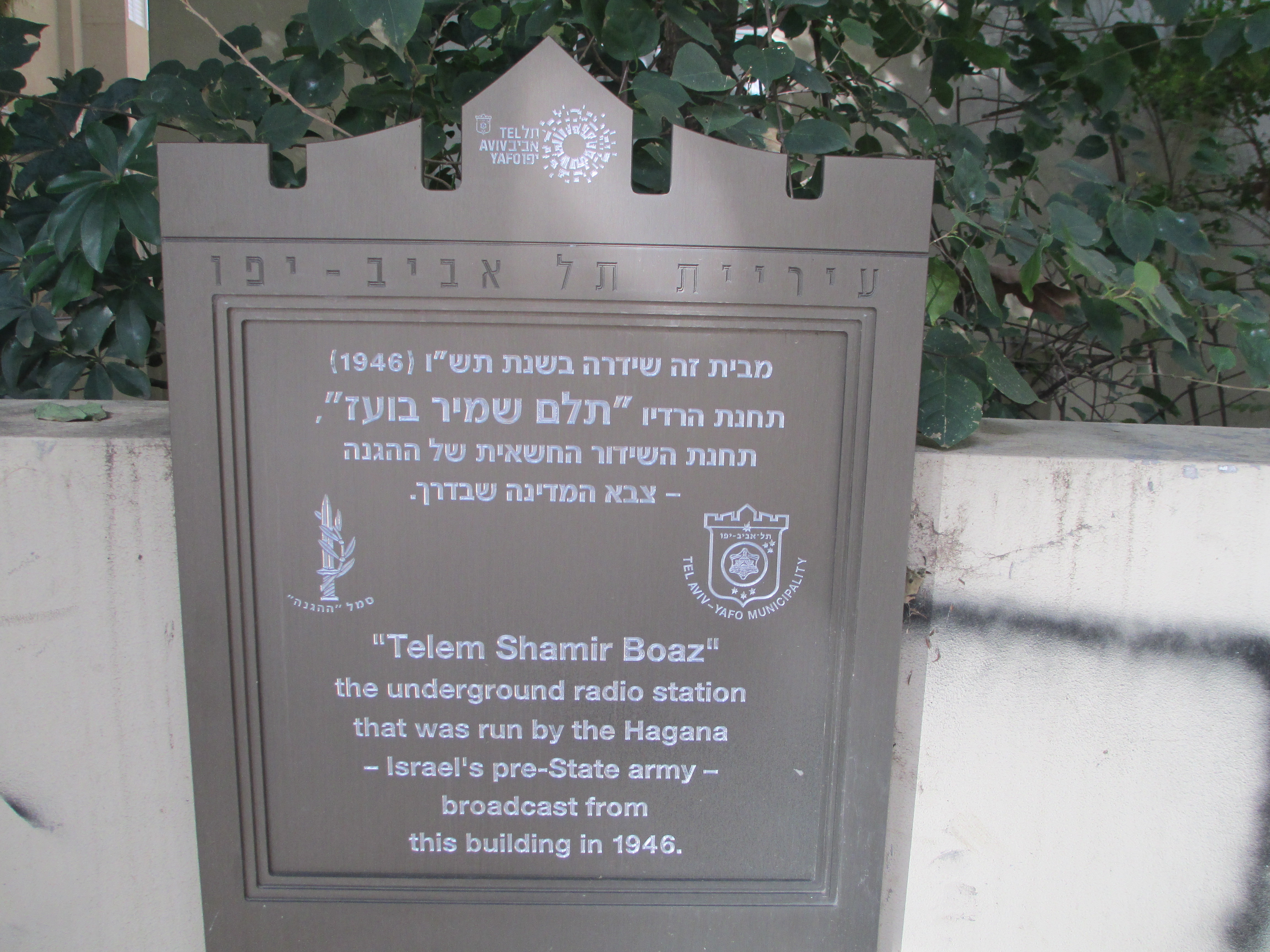 לוחית זיכרון לתחנת השידור של ההגנה "תלם שמיר בועז" ברחוב ורבורג 5 בתל אביב